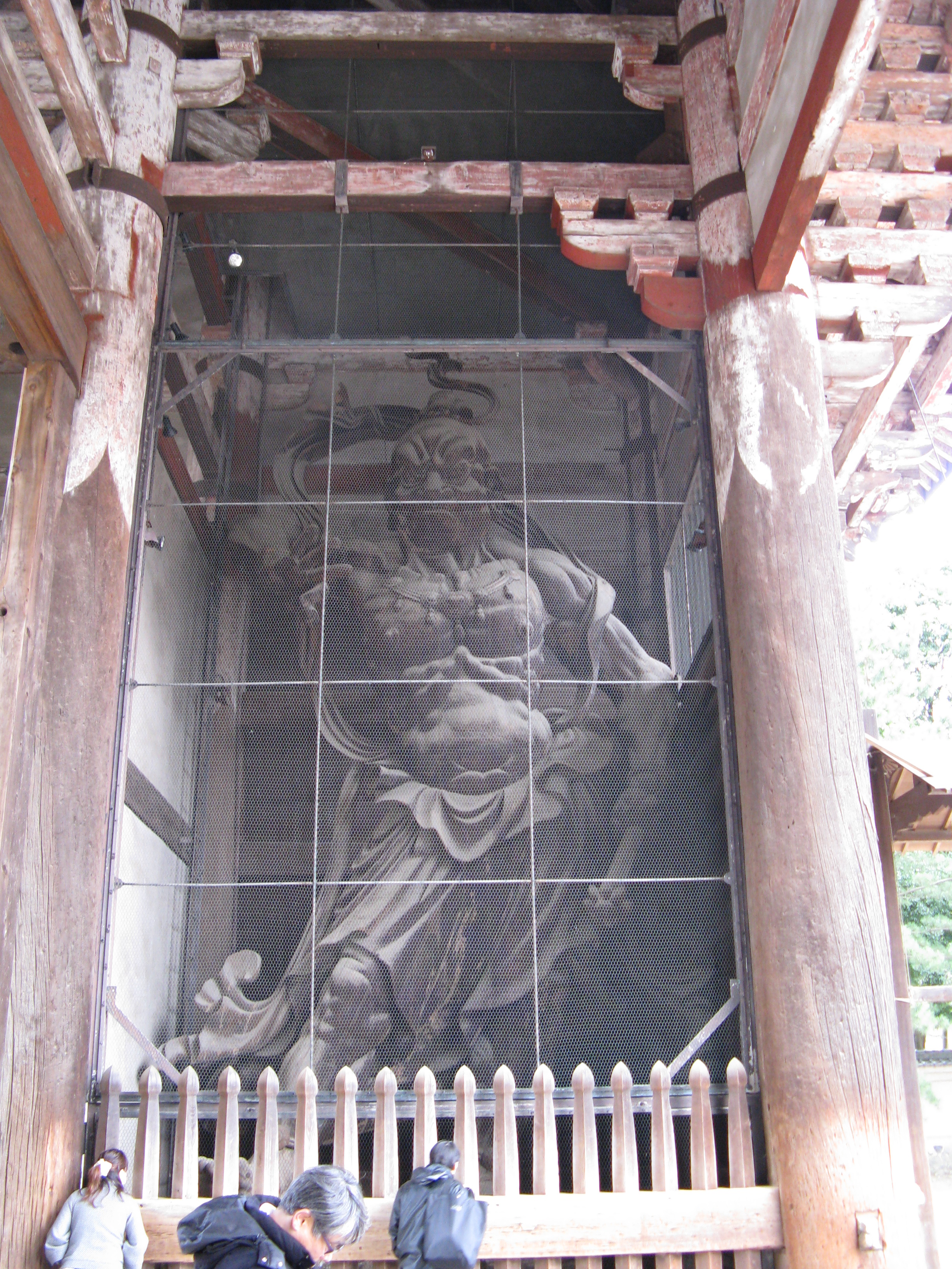 東大寺 中門 持国天